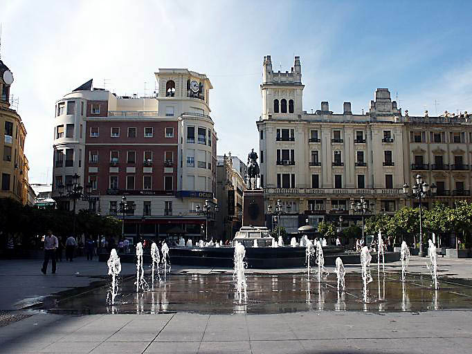 Plaza de las Tendillas, en Córdoba, España